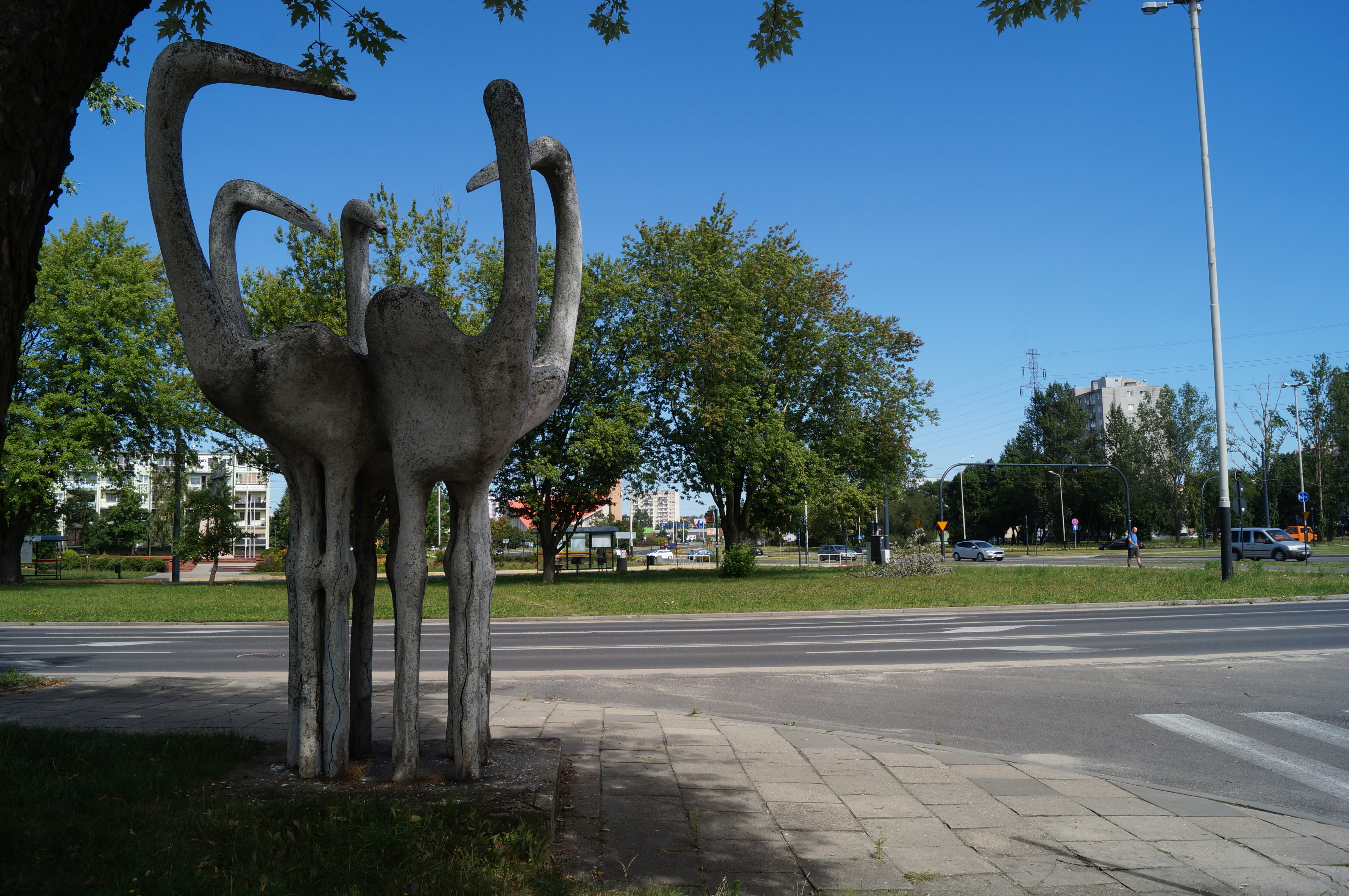 Bociany - Gałkiewicz Fot. Michał Dondzik, 2017